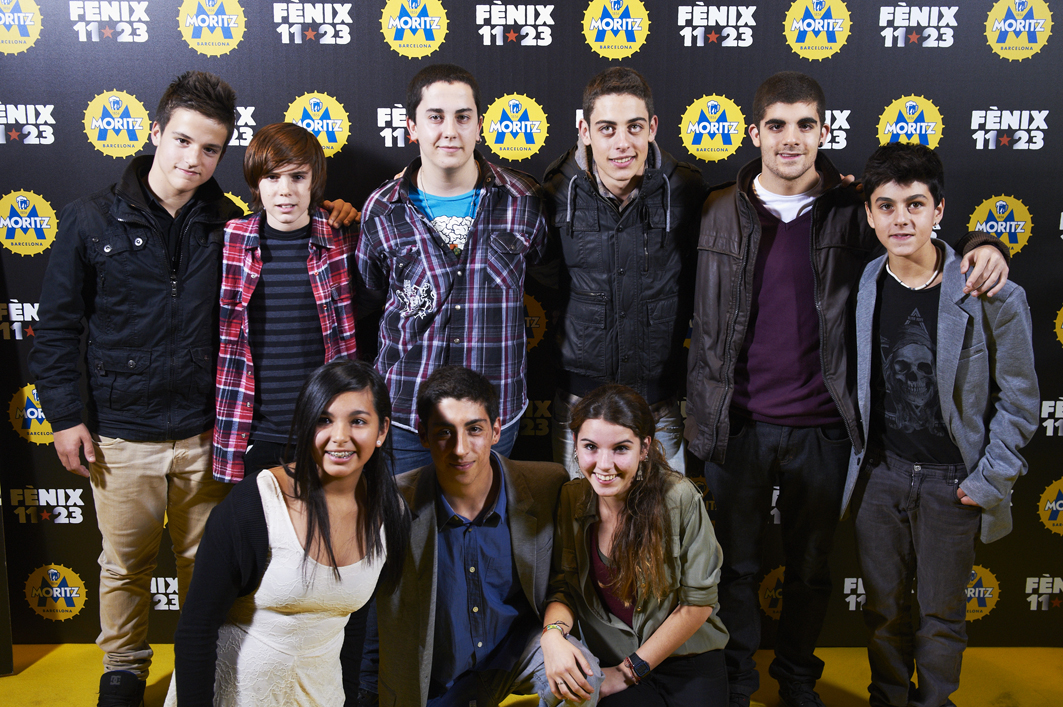 Estreno de la película Fènix 11:23.